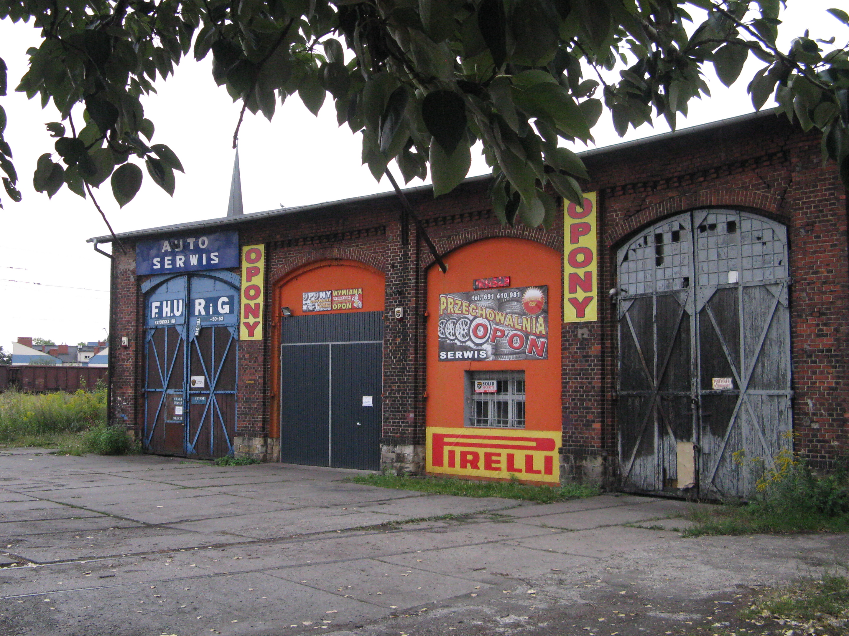 Dawna lokomotywownia przy ul. Katowickiej (w pobliżu adresu 8b) w Mysłowicach.